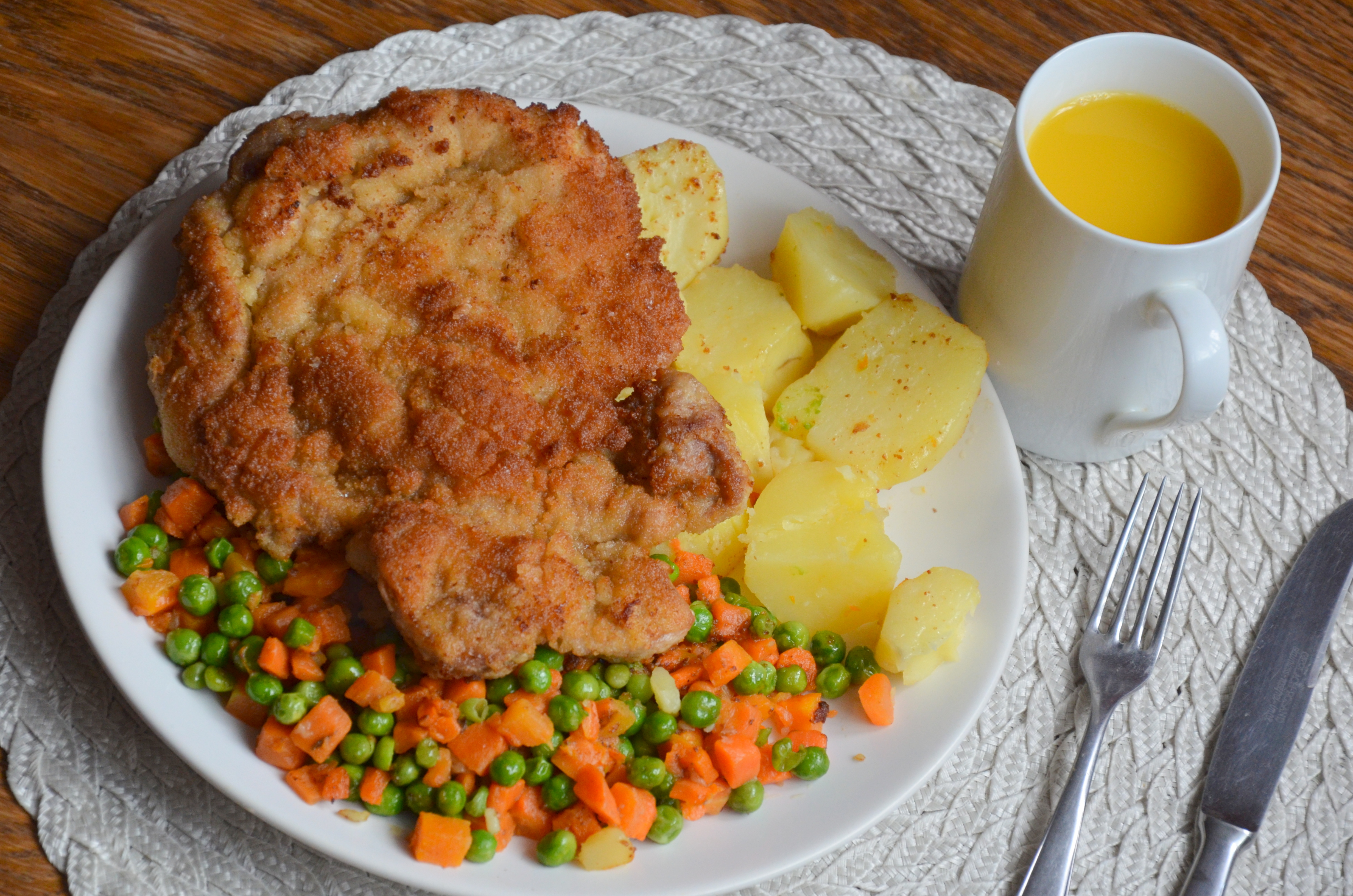 Schweinskotelett mit Gemüse und Rösterdäpfel